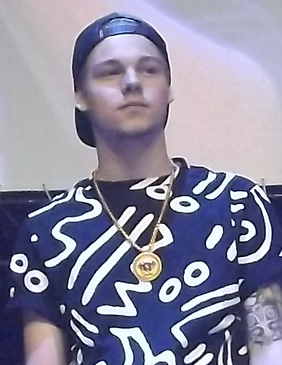 Deutscher YouTuber während der Center Show des Videodays 2014: Taddl.